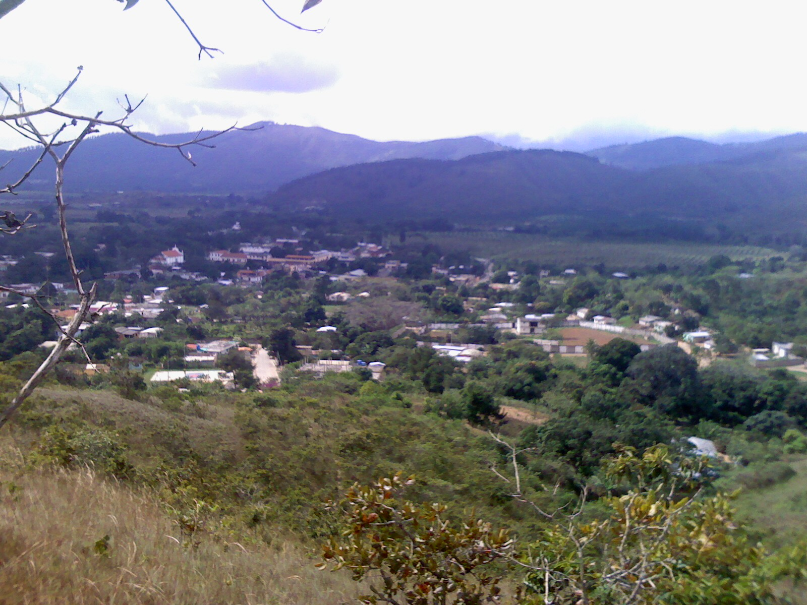 salom